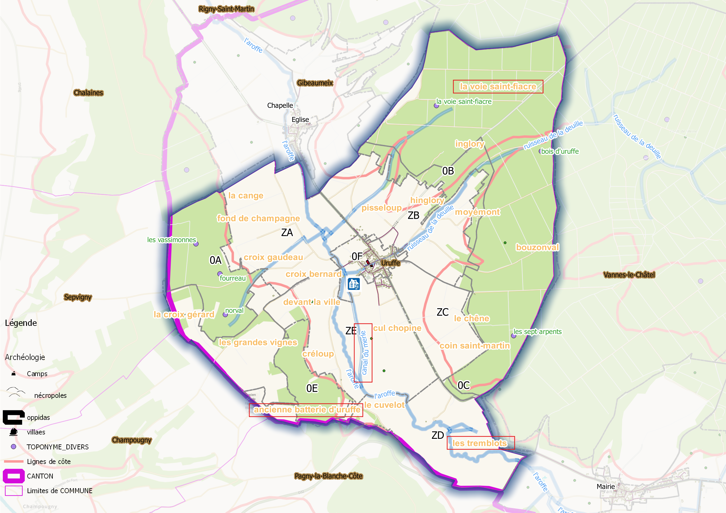 Uruffe (ban communal) Osm et Qgis, mentions additionnelles